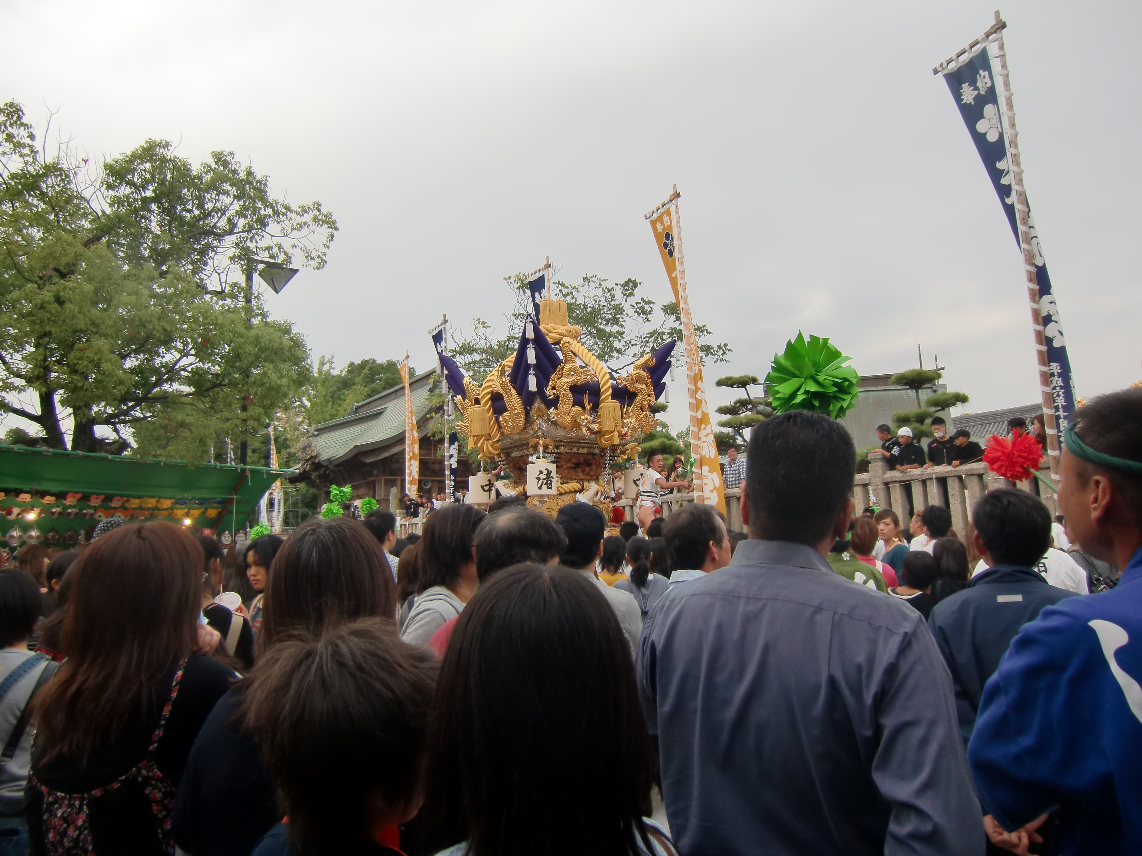 伊保中部屋台